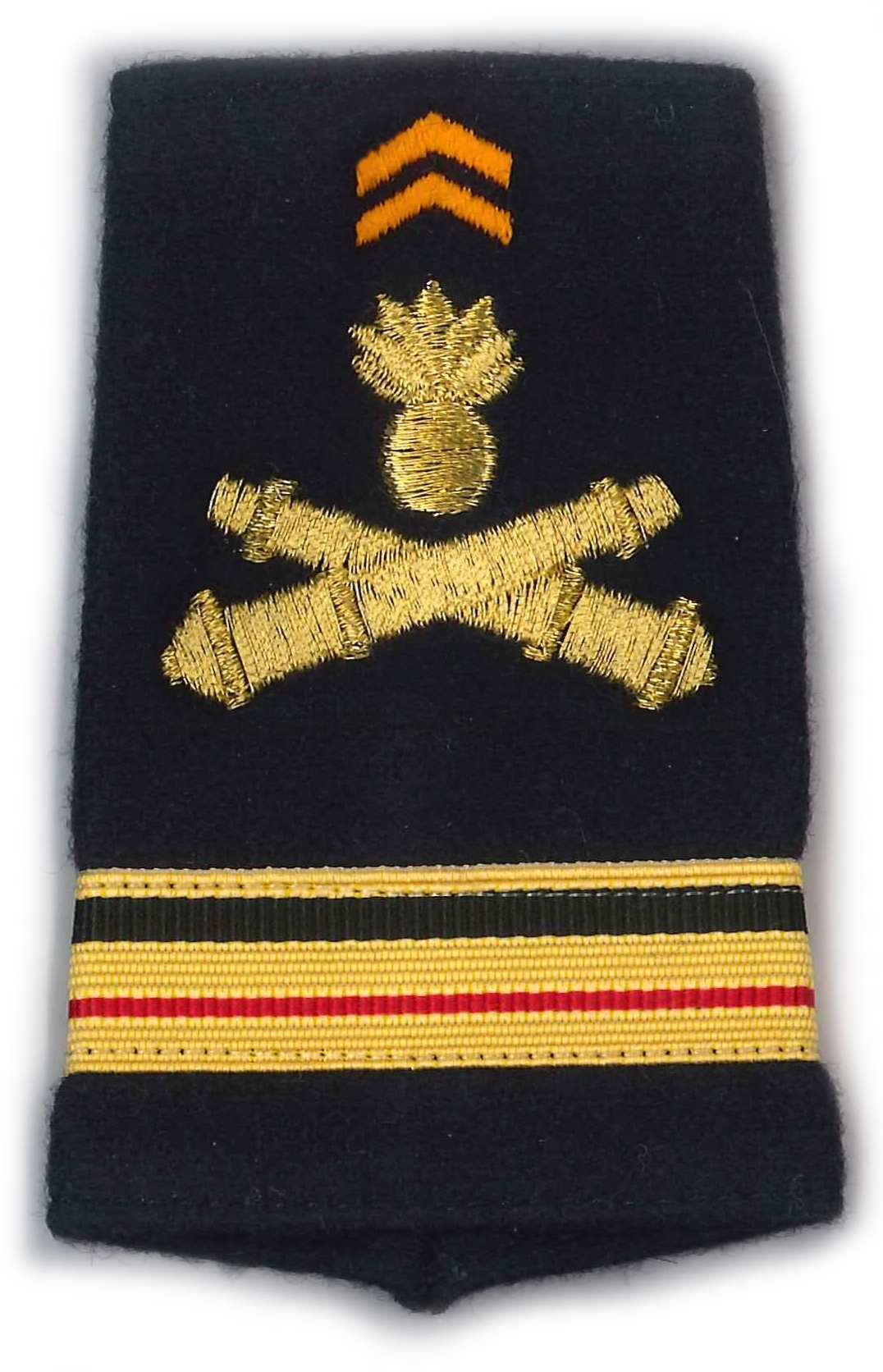 Fourreau d'épaule de grade de major de l'armée de terre française - artillerie 28°groupe géographique